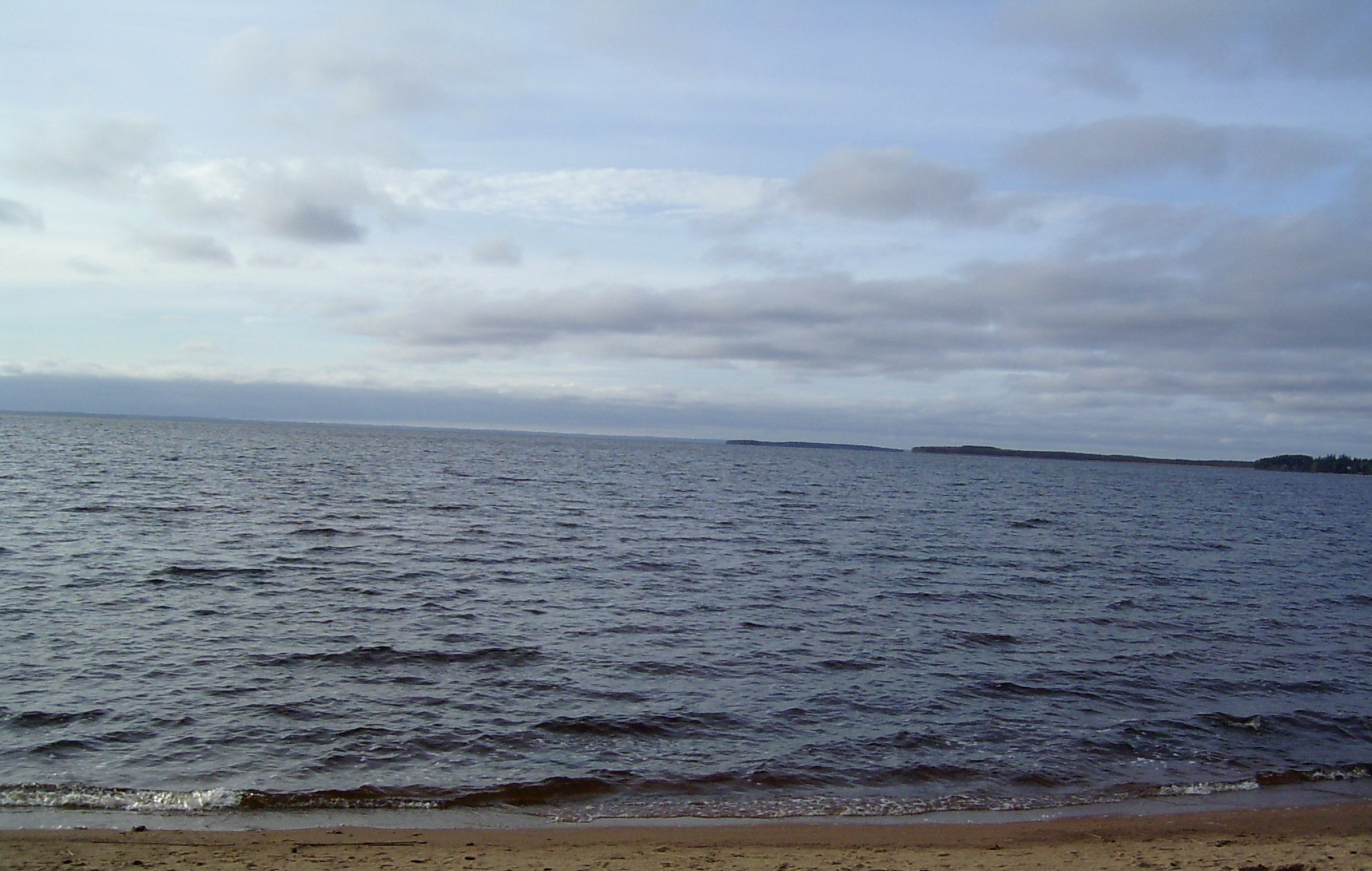 Seämärvi (Karelian) (Finnish Säämäjärvi, Russian Сямозеро, Siamozero) lake in Karelia near Säpsä.